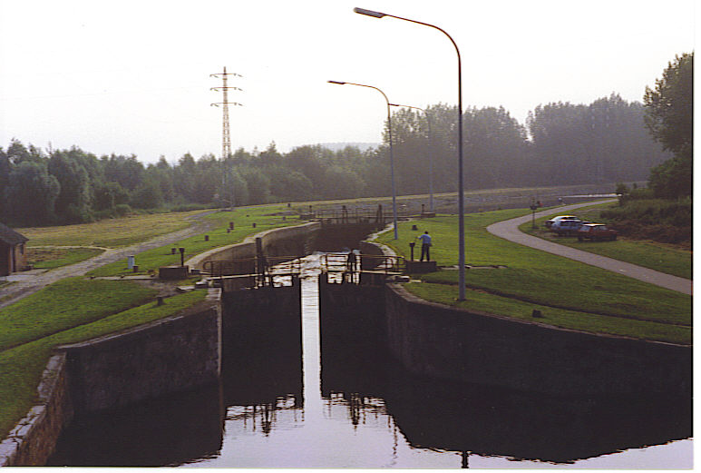 eigen foto